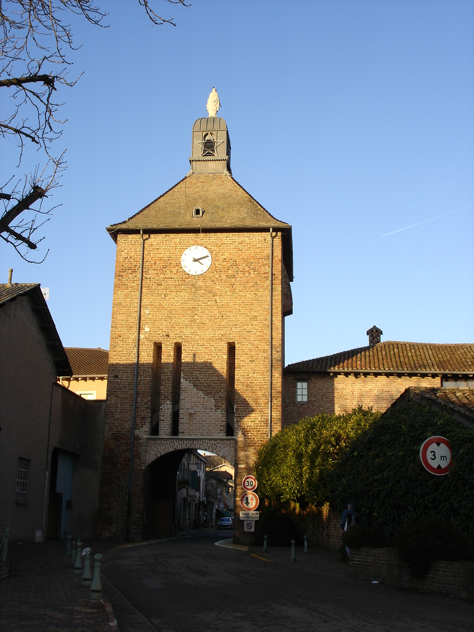 Pont de Veyle : La tour de l'horloge